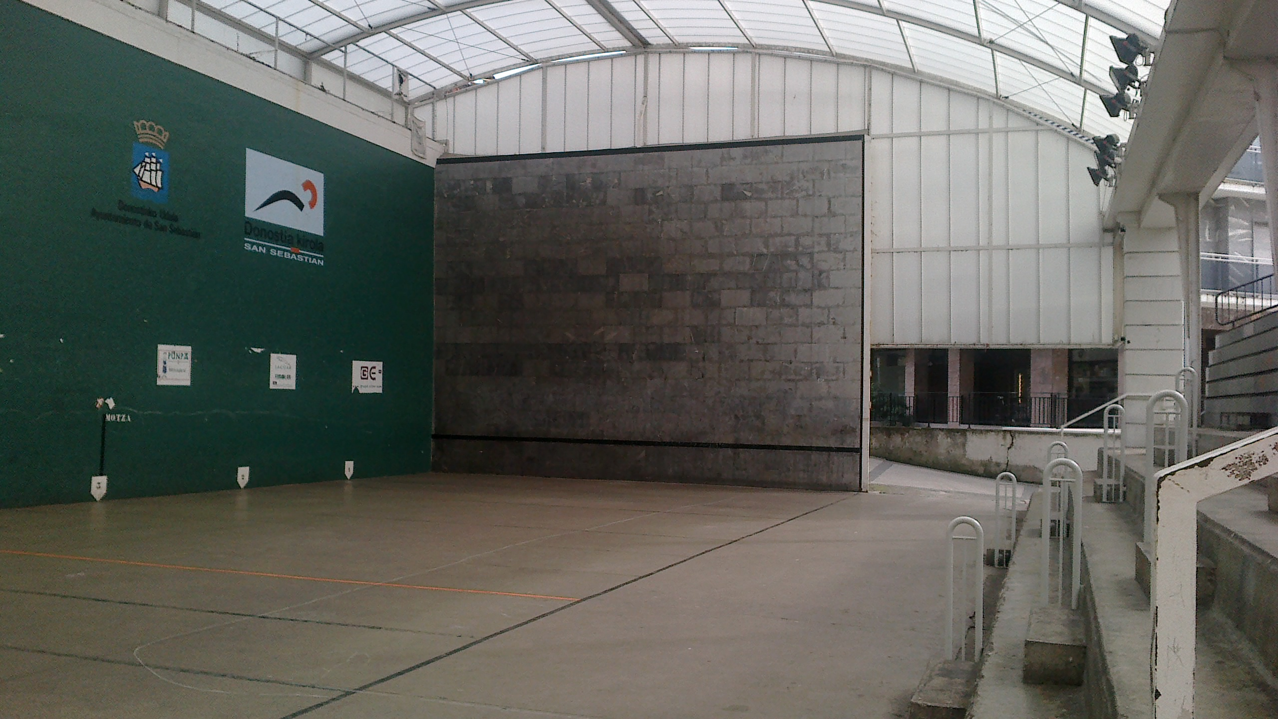 Antiguako (Donostia) pilotalekua